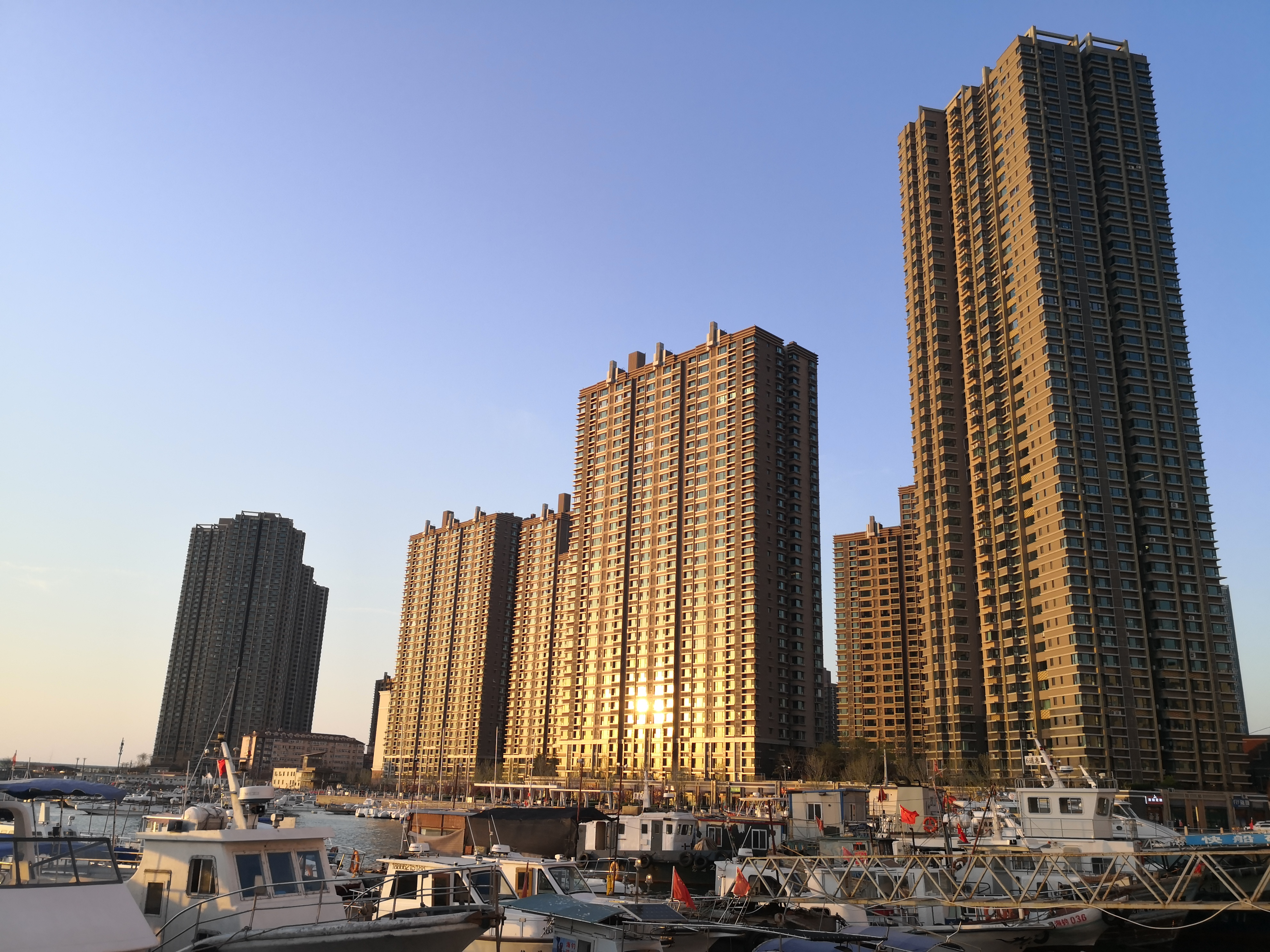 青岛晓港名城六期